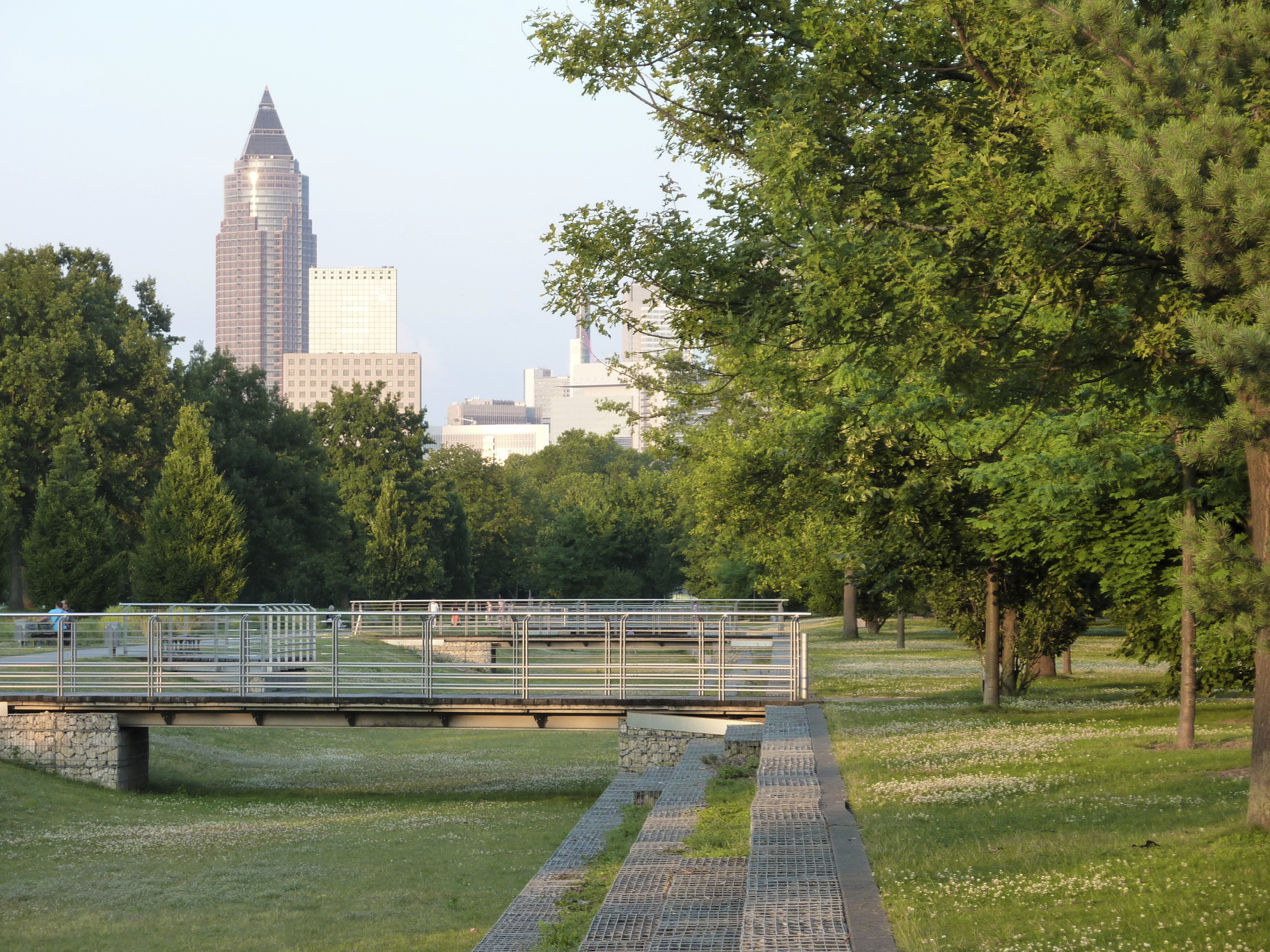 Frankfurt am Main, Stadtteil Bockenheim, Rebstockviertel: Der Neue Rebstockpark ist eine im Jahr 2005 eröffnete öffentliche Grünanlage, gestaltet im Stil moderner Landschaftsarchitektur. Das Foto zeigt den 400 Meter langen, „Rasengracht“ genannten Graben im Park, Blick nach Osten. Links im Hintergrund die Hochhäuser Messeturm und Messe-Torhaus